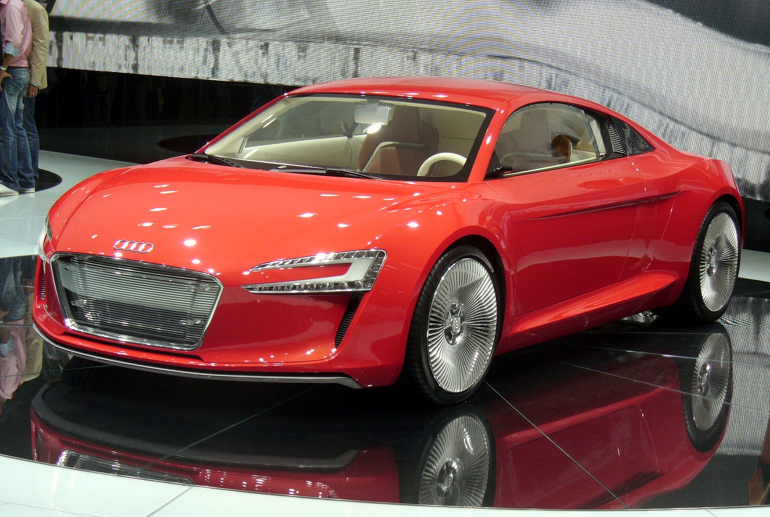 Audi e-tron